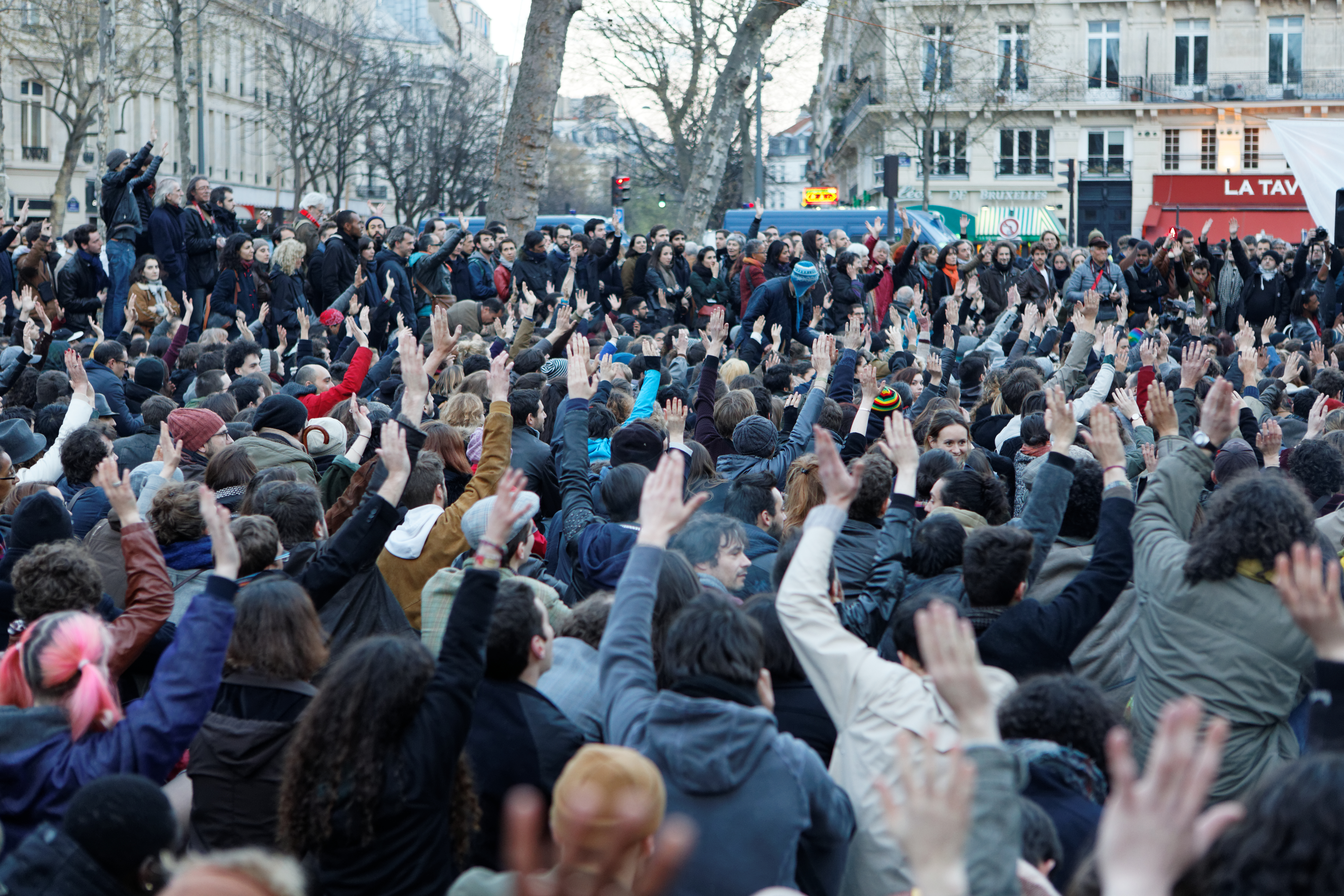 Rassemblement "Nuit Debout" à Paris le 42 mars.